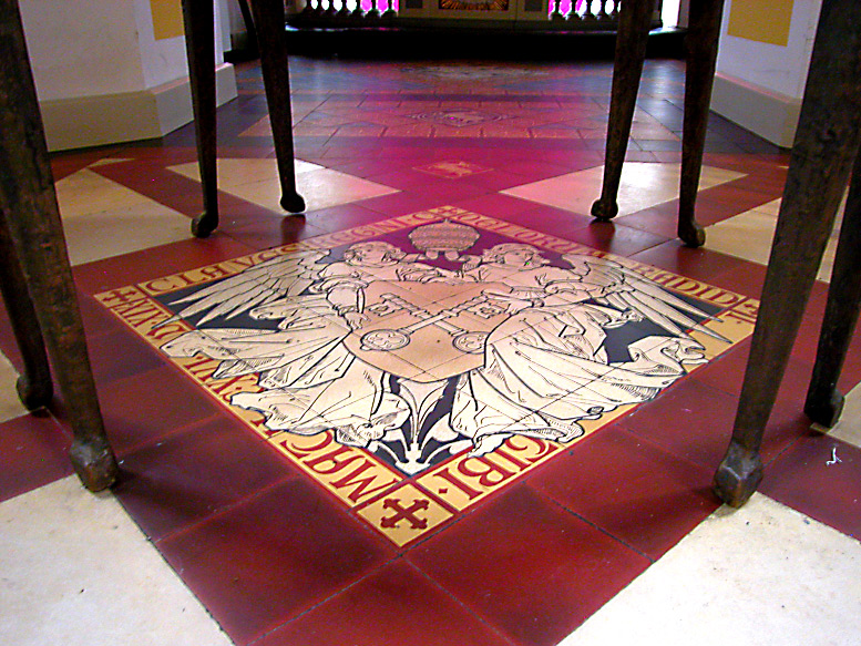 Die Darstellung auf dem Fußboden der Kapelle